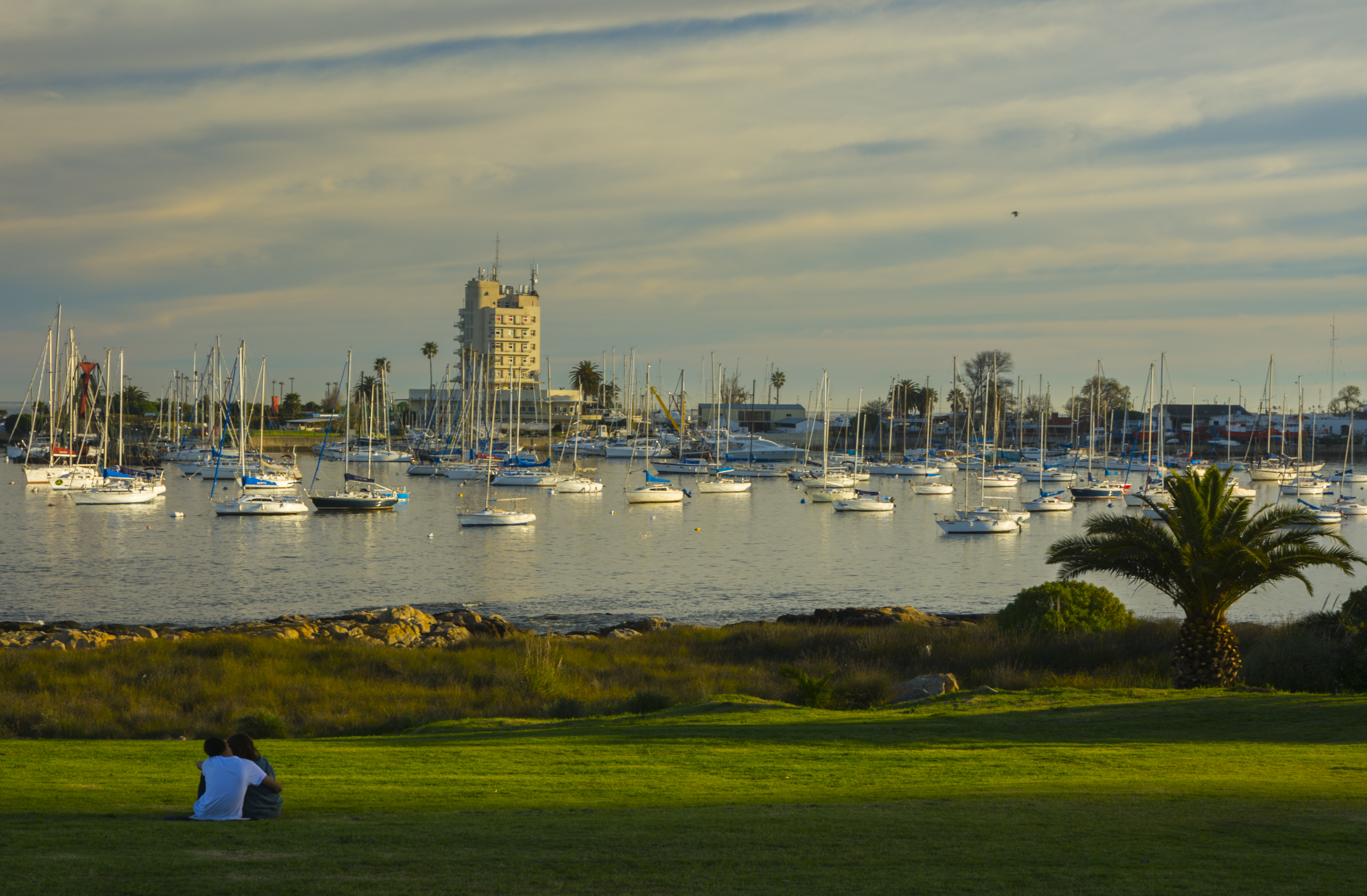 Yacht Club. Ubicada en el departamento de Montevideo